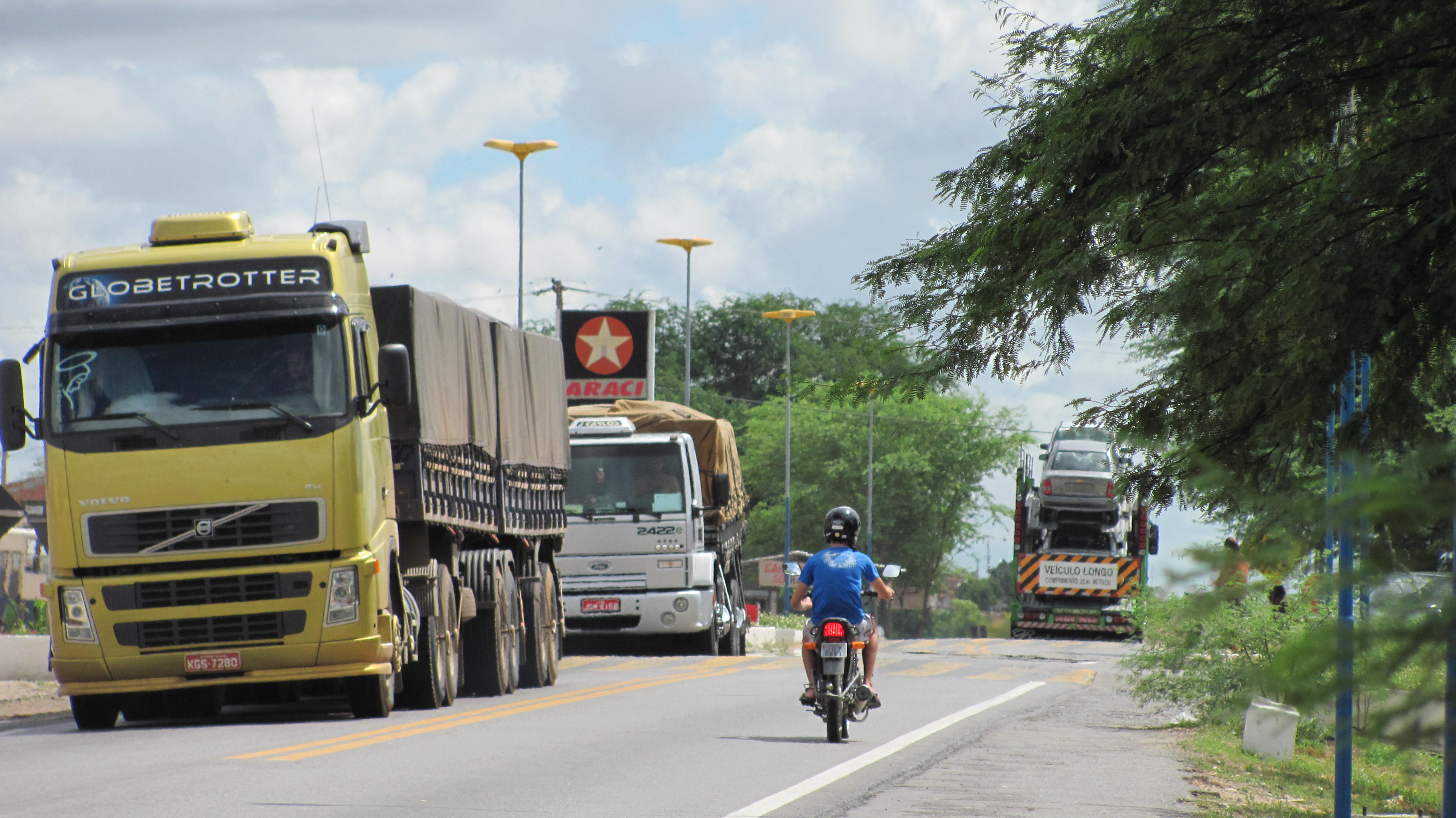 Foto da Cidade de Araci da Bahia